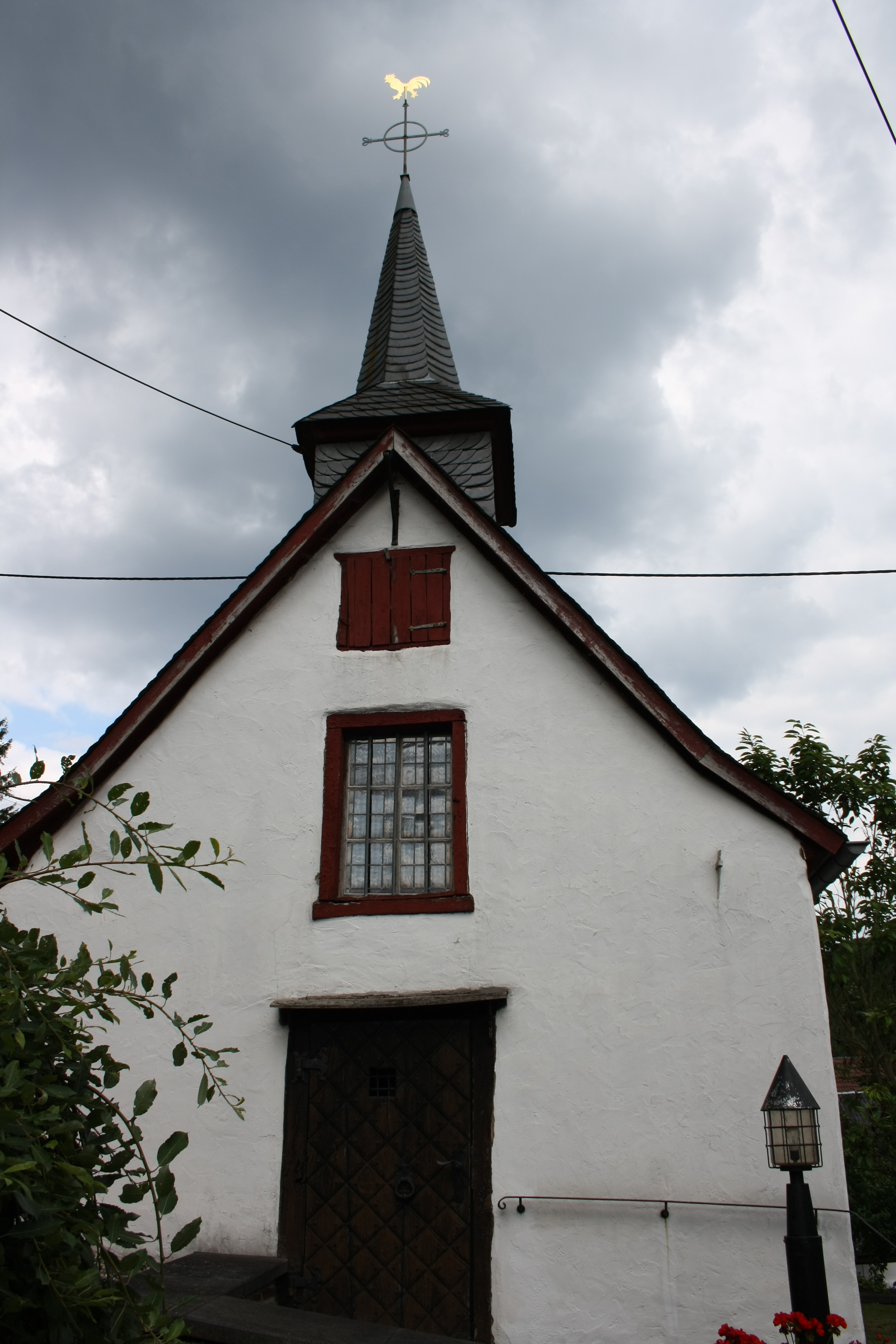 katholische Kapelle St. Agatha und Lutger in Lückenbach, einem Ortsteil von Dümpelfeld